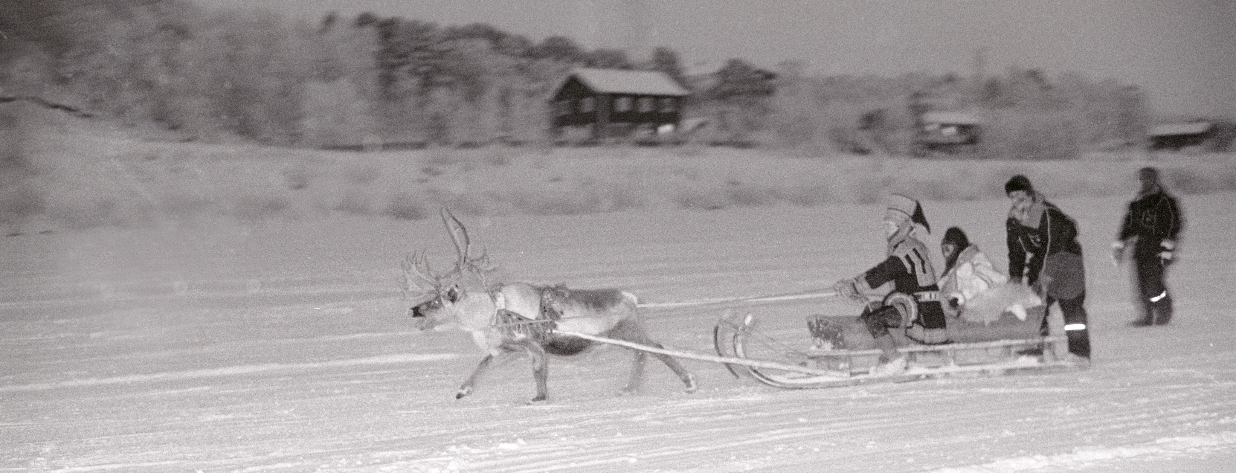 Den 14. Dalai Lama besøkte Sametinget og Karasjok i 1989 i forbindelse med sitt besøk i Norge i forbindelse med at han vant Nobels fredspris. Foto: Harry johansen.